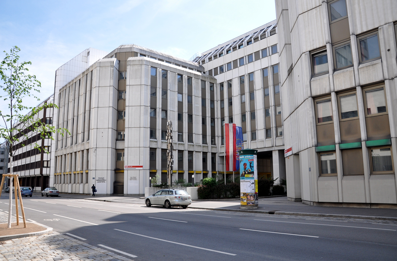 2012 Wien 0126